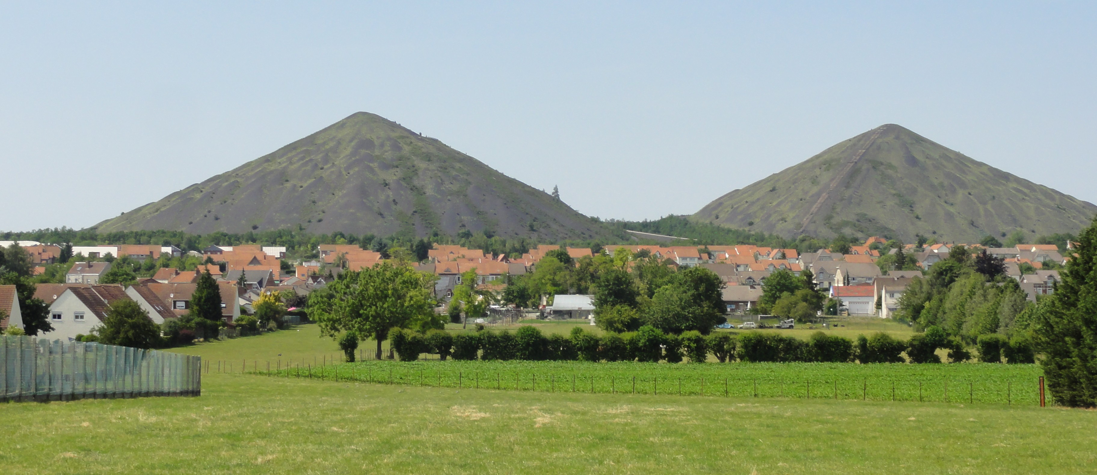 Terrils nos 74, 74A et 74B respectivement dénommés 11 - 19 de Lens Est, 11 - 19 de Lens Ouest et 11 - 19 de Lens Nouveau, fosse n° 11 - 19 de la Compagnie des mines de Lens dans le bassin minier du Nord-Pas-de-Calais, Loos-en-Gohelle, Pas-de-Calais, Nord-Pas-de-Calais, France. Les terrils nos 74, 74A et 74B sont inscrits sur la liste du patrimoine mondial de l'Unesco le 30 juin 2012 et y constituent en partie le site no 63.